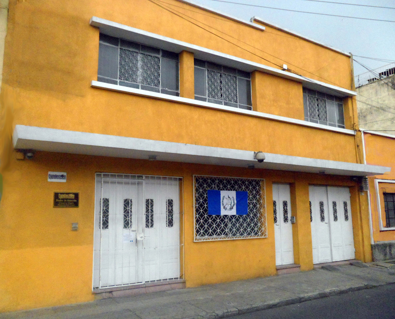 12 calle 11-63 zona 1, ciudad de Guatemala. (2009)